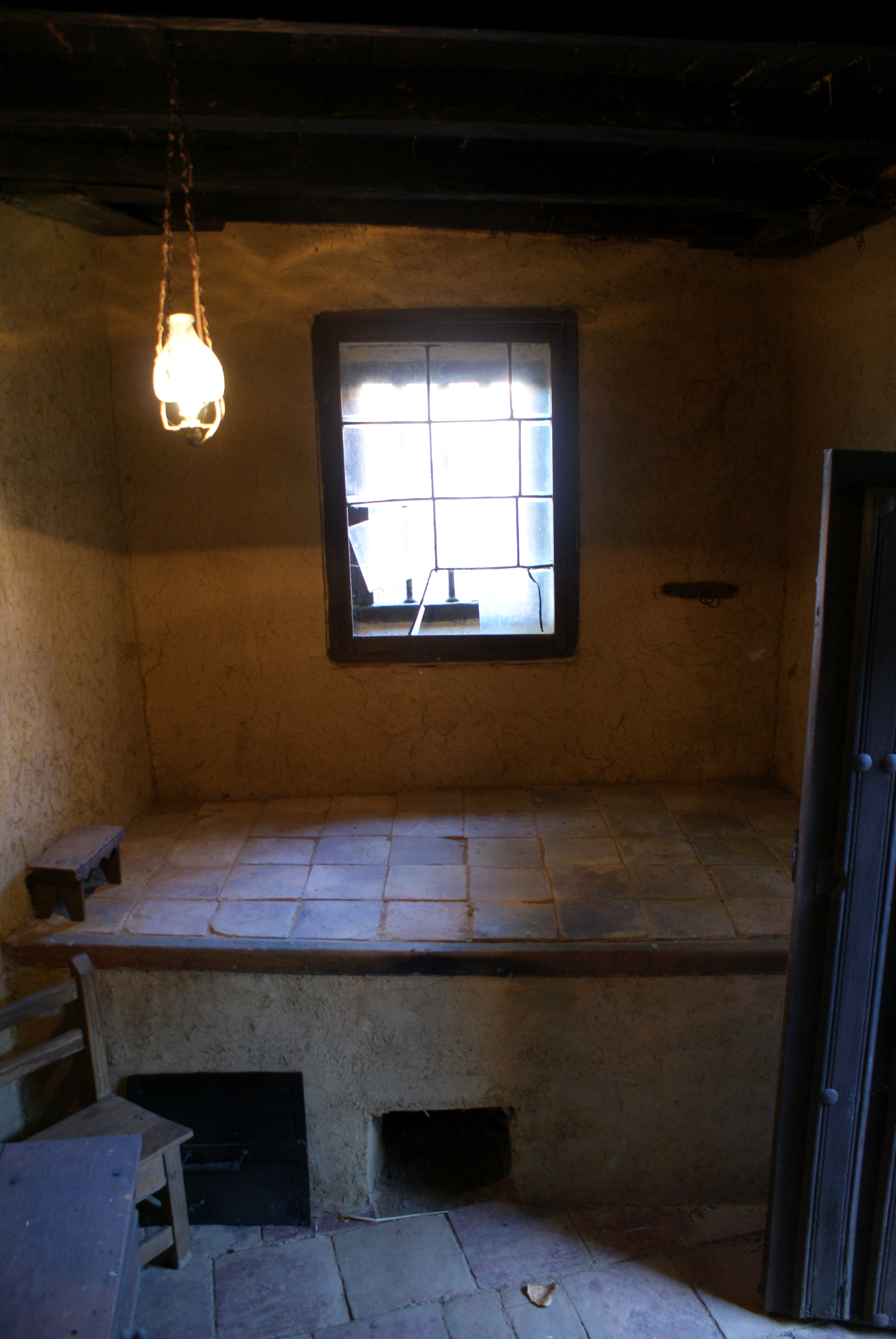 Cocina, con la característica trébede utilizada para cocinar y calentarse, perteneciente a la "casa de San Martín" en Cervatos de la Cueza (provincia de Palencia, España).